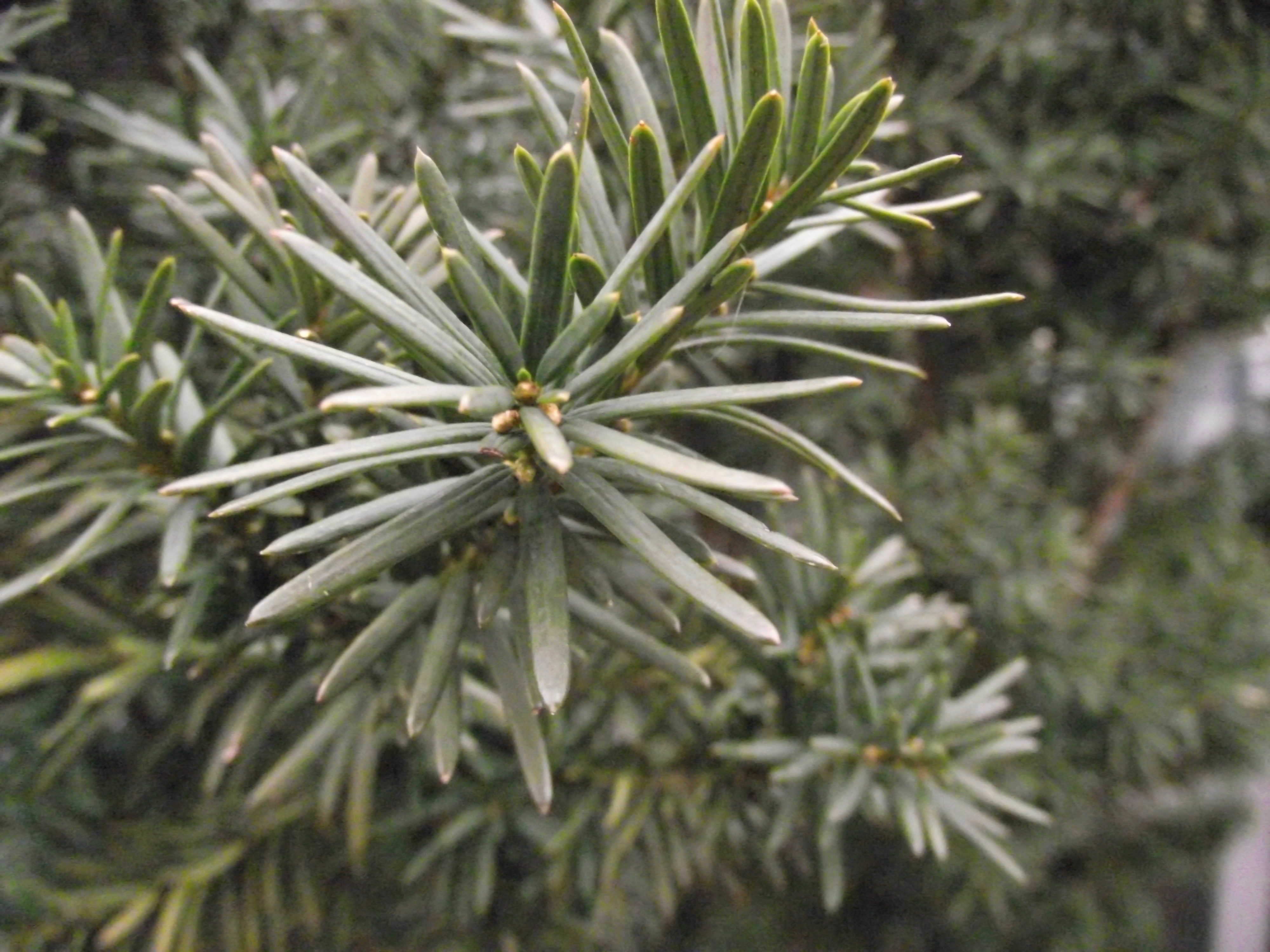 Murska Sobota